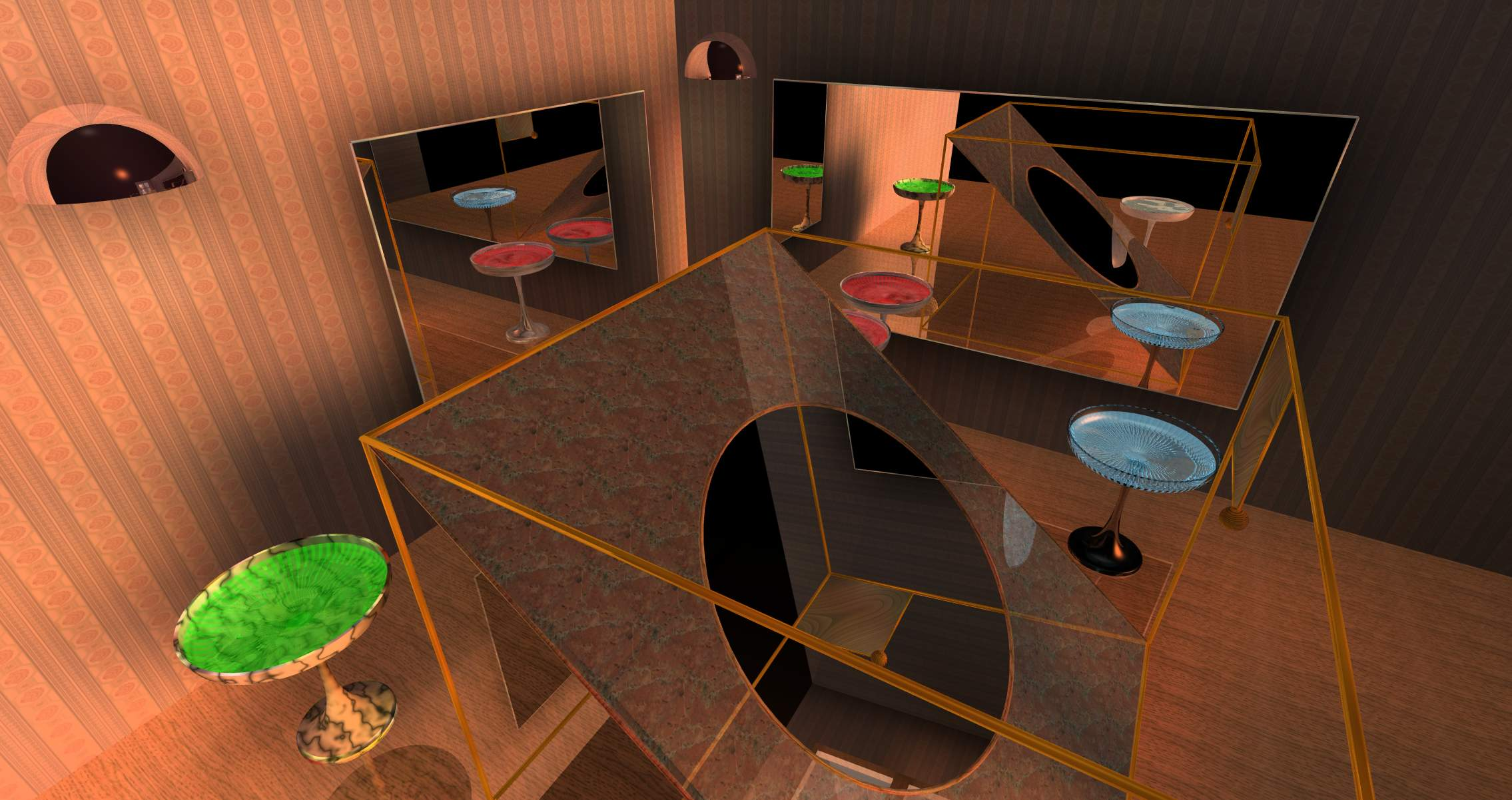 Spiegelungen und Reflexionen in einem Raum, mit MicroStation erstellt, Particle Trace